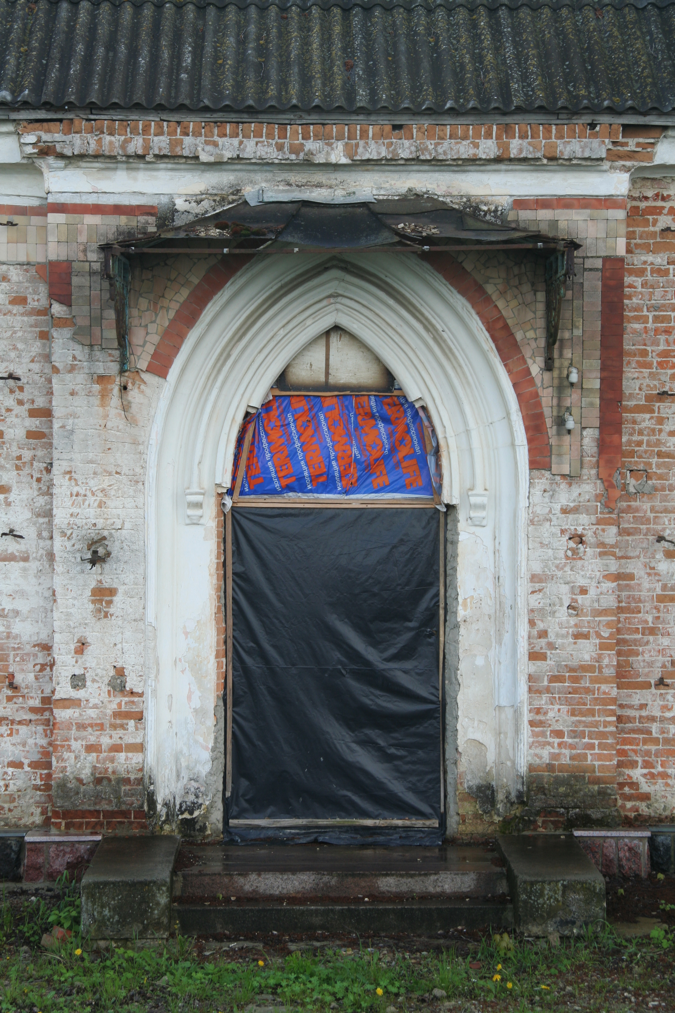 Поштова станція у с.Антопіль 315км Е40